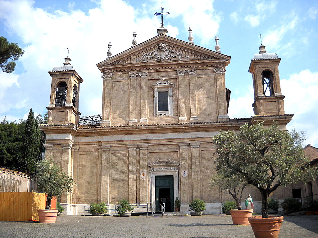 Chiesa di Sant Anastasia al Palatino